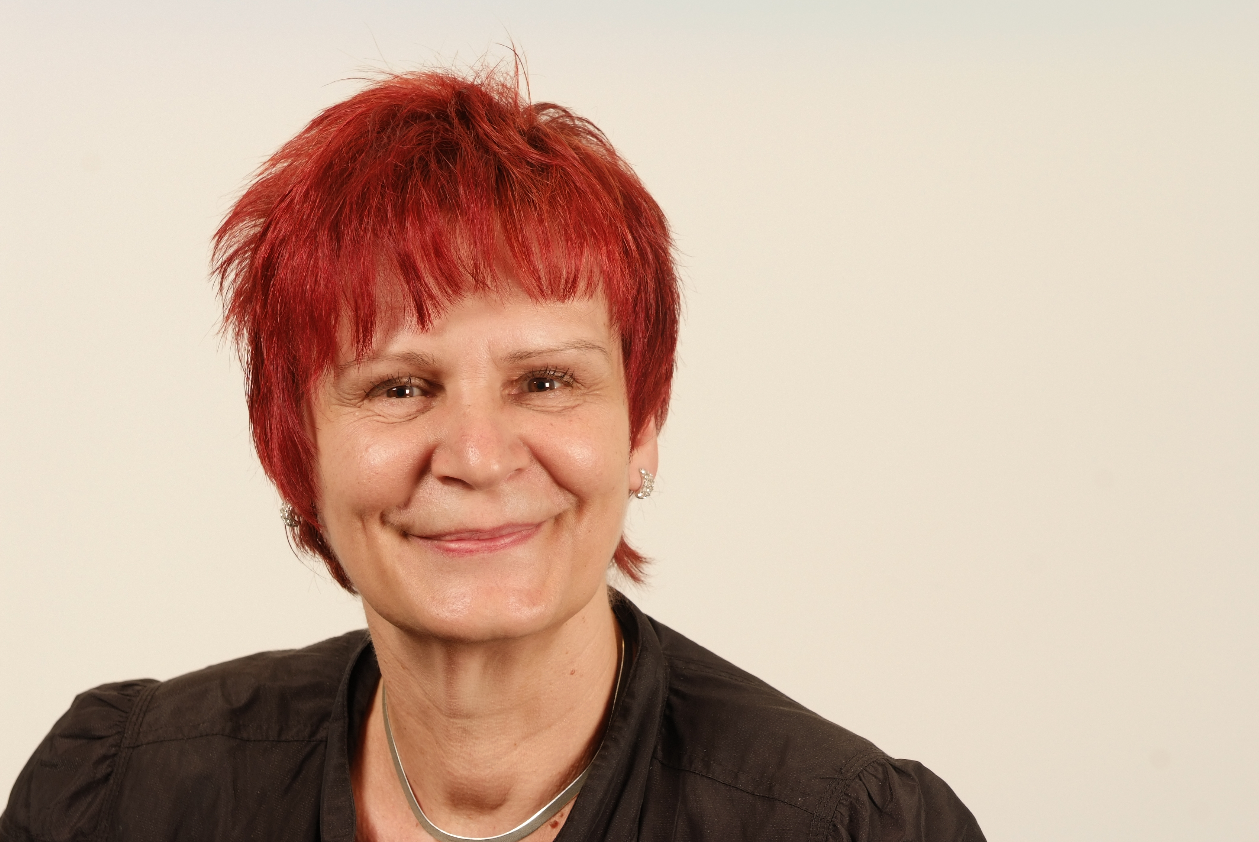 Landtag Thüringen, 18. Mai 2011 in Erfurt Birgit Klaubert